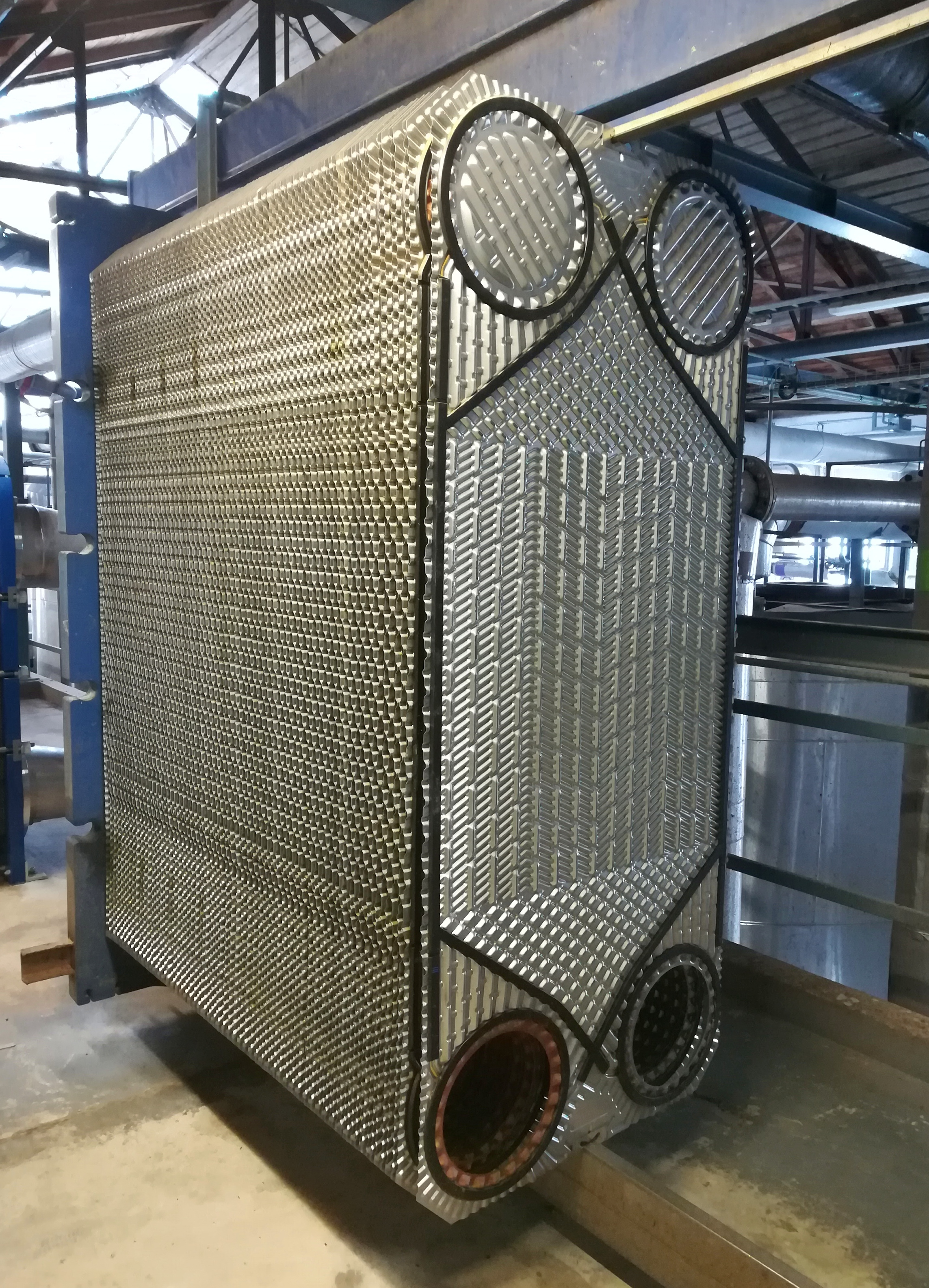 Dismantled Alfa Laval plate heat exchanger from 2006.